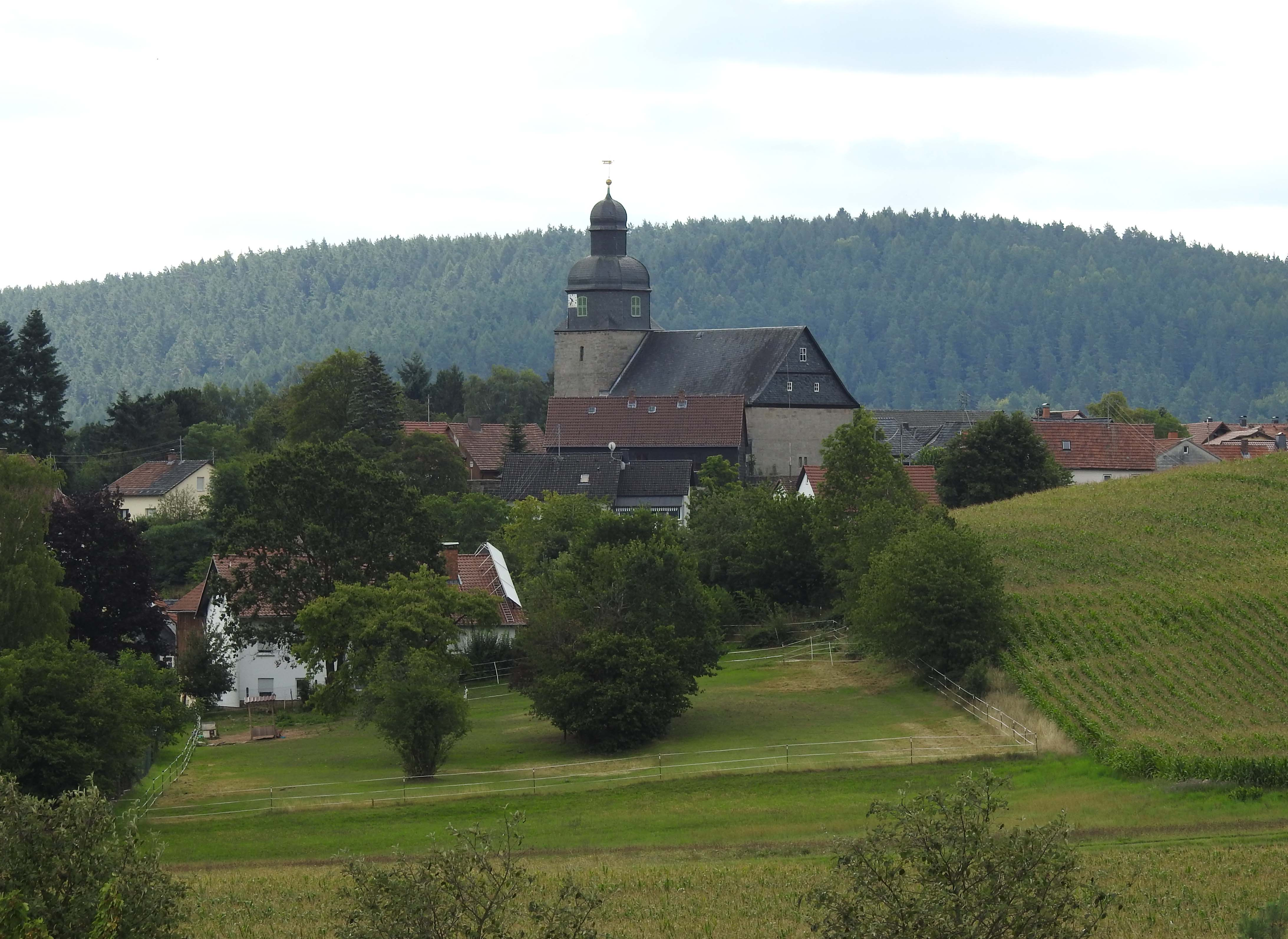 Burggrub, Stockheim, von Nordwesten